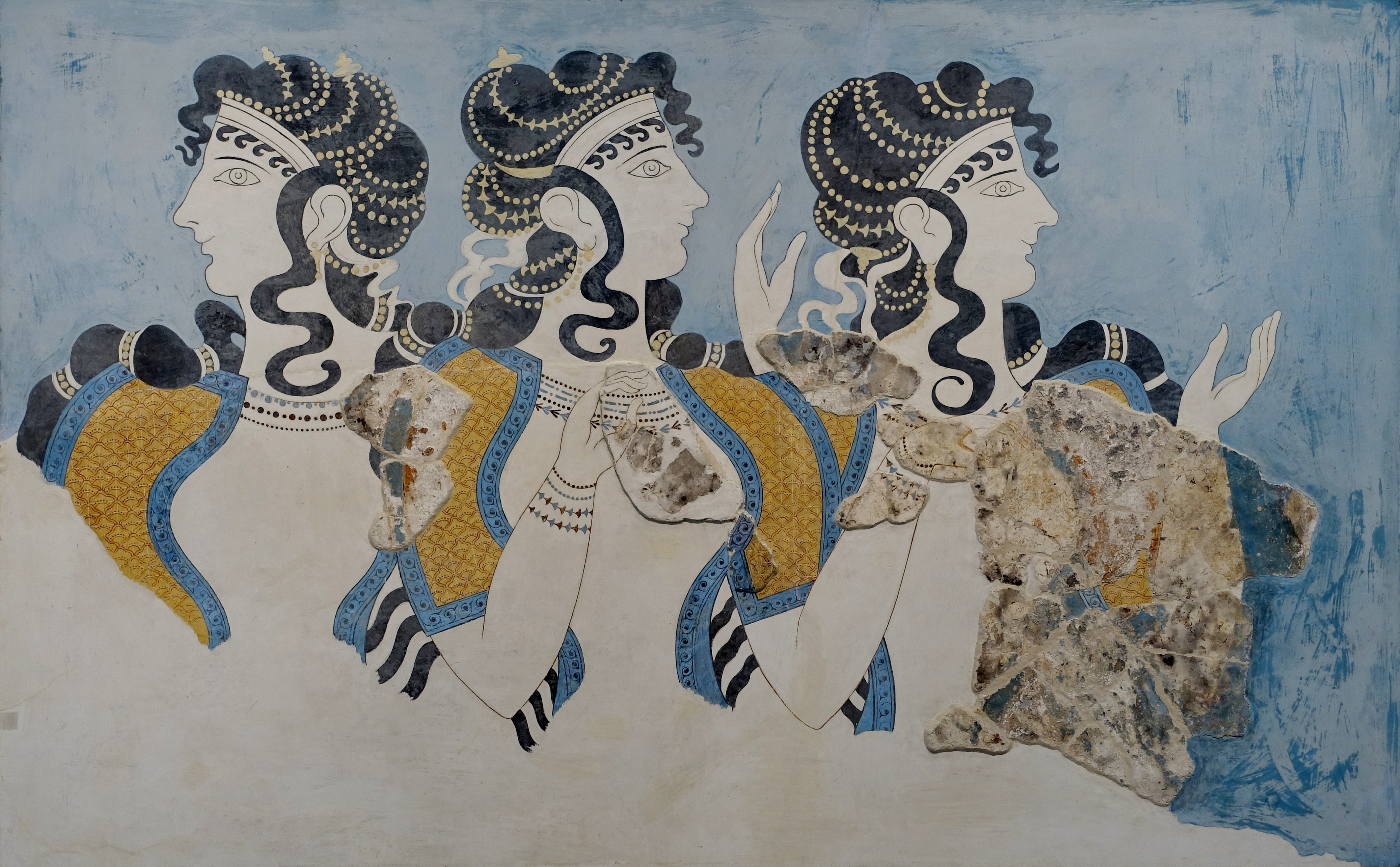 Fresko der drei „Damen in Blau“ aus dem Vorraum des Thronsaals im Ostflügel des Palastes von Knossos (1600–1450 v. Chr.), ausgestellt im Archäologischen Museum Iraklio, Kreta, Griechenland